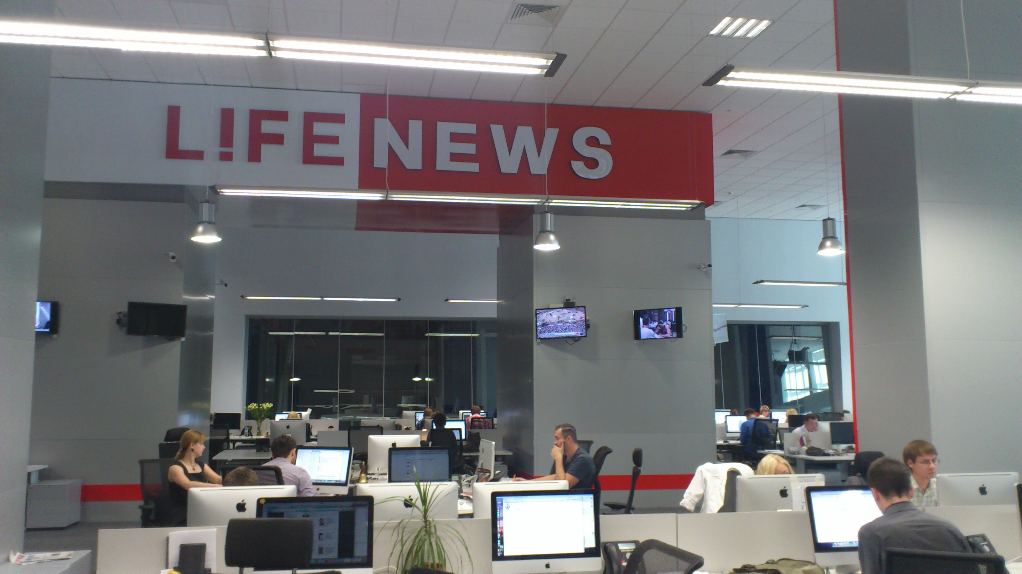 Ньюсдеск федерального информационного портала Life News